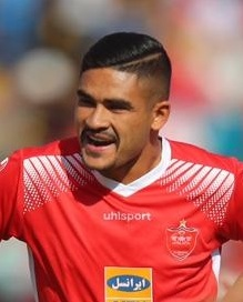 تراکتورسازی و پرسپولیس